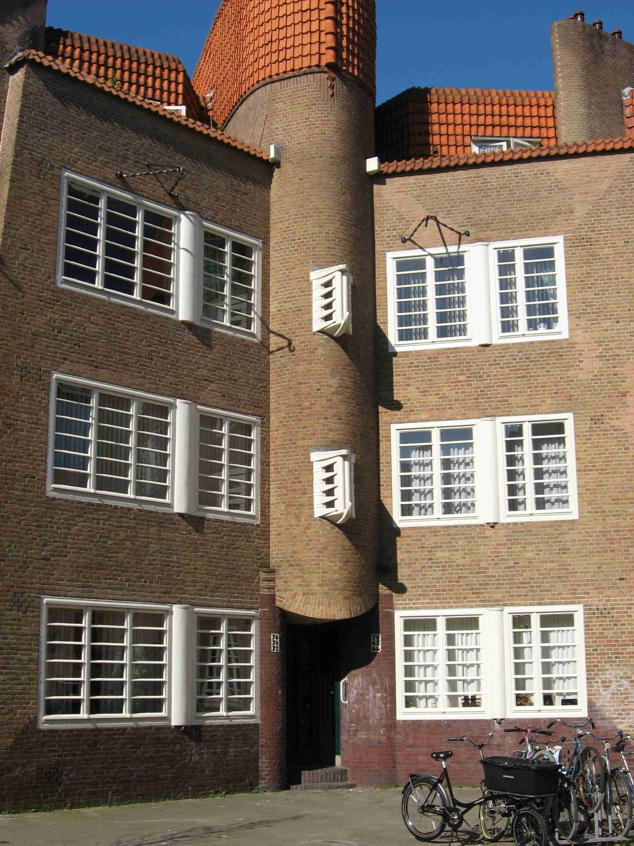 Amsterdamse School, Burgemeester Tellegenstraat 66-76